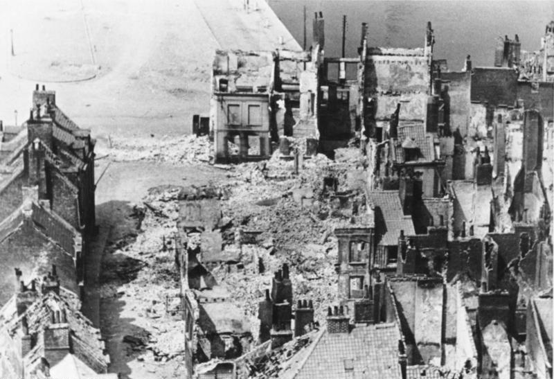 Calais. Zerstörtes Hafenviertel. 1.6.1940, 12.30 Uhr